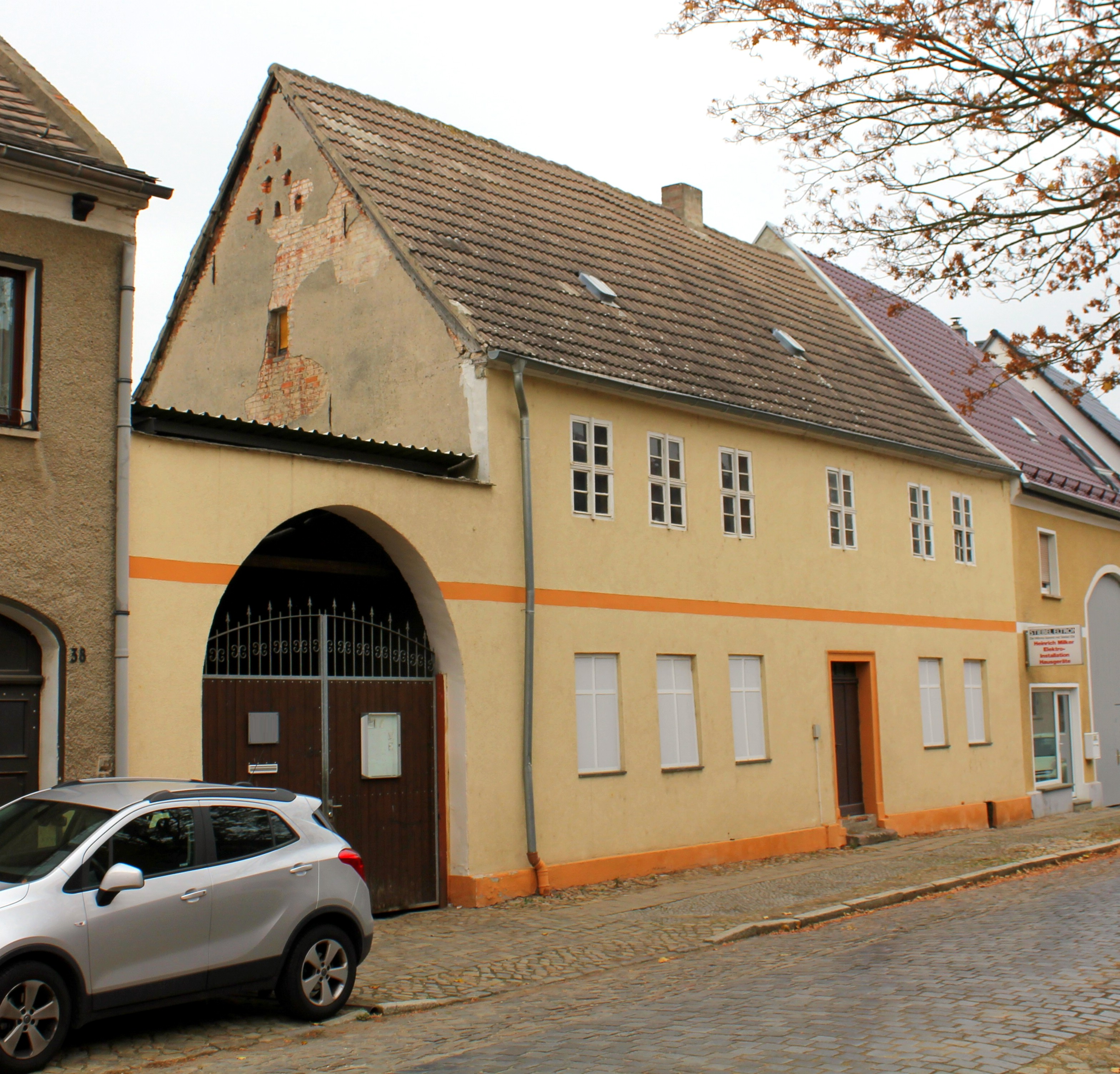 Wohnhaus Schulzenstraße 36 Barby